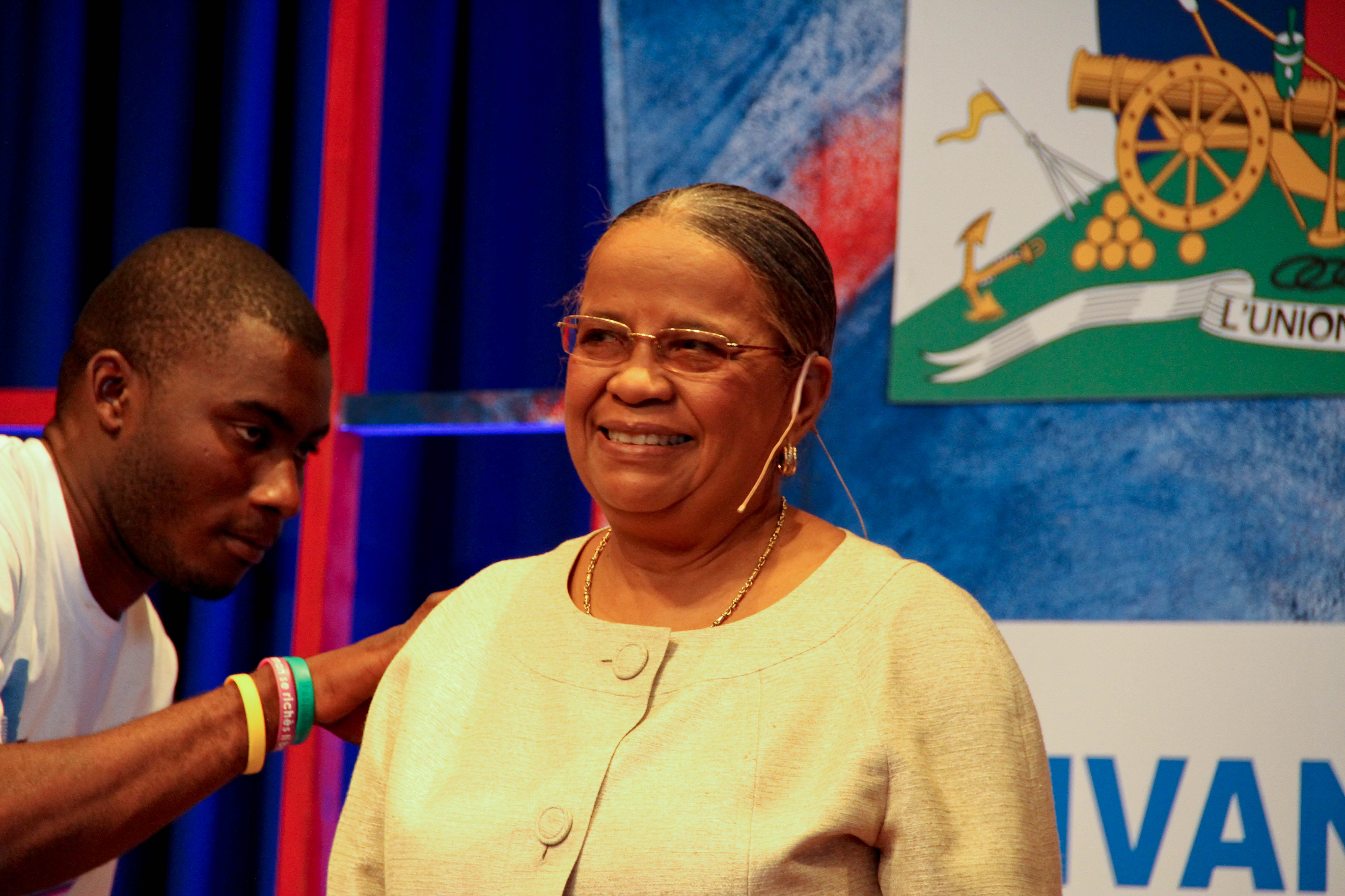 Marlande Manigat, política de Haití.